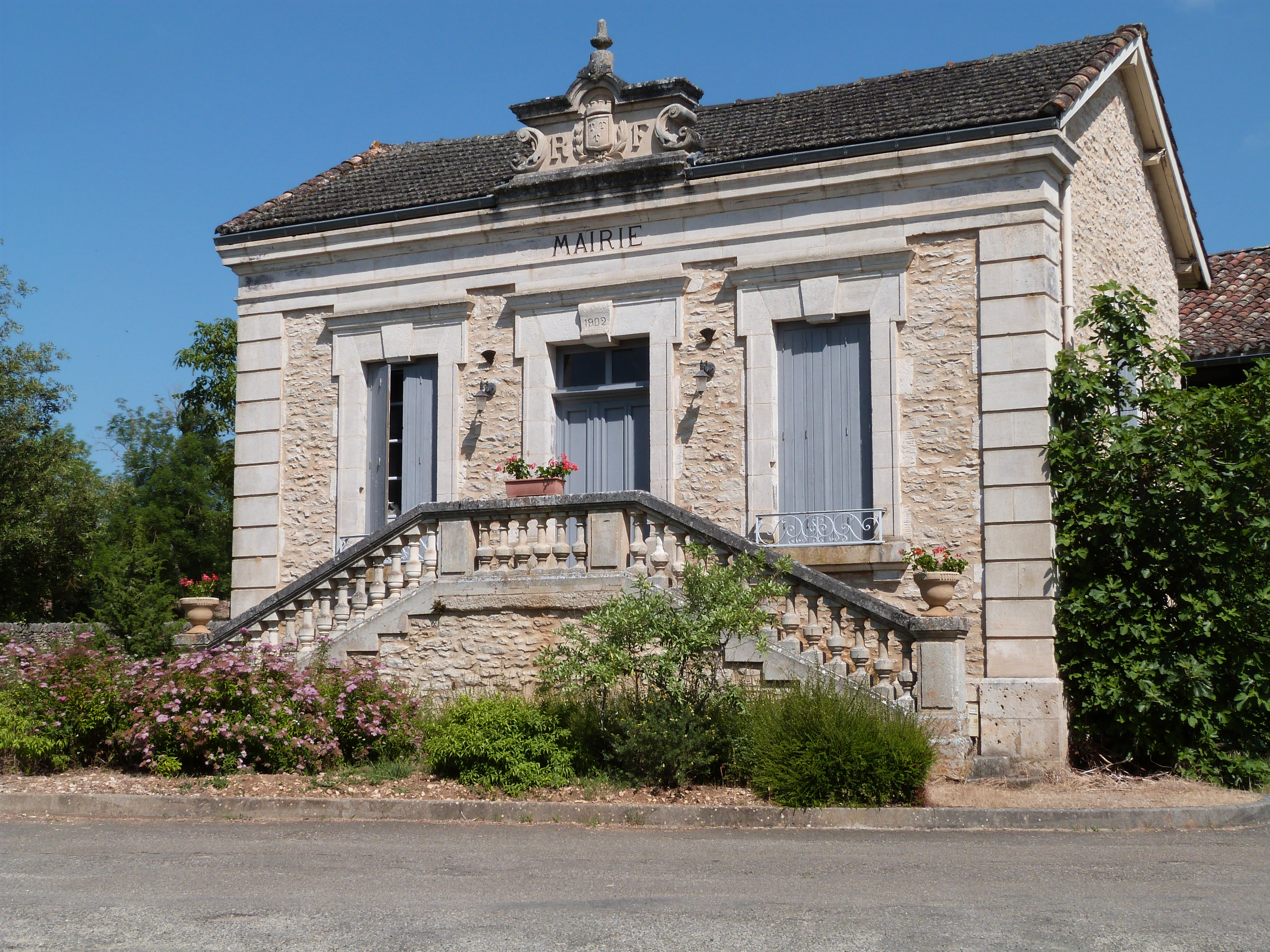 La mairie d'Aujols se situe à proximité des lavoirs papillons